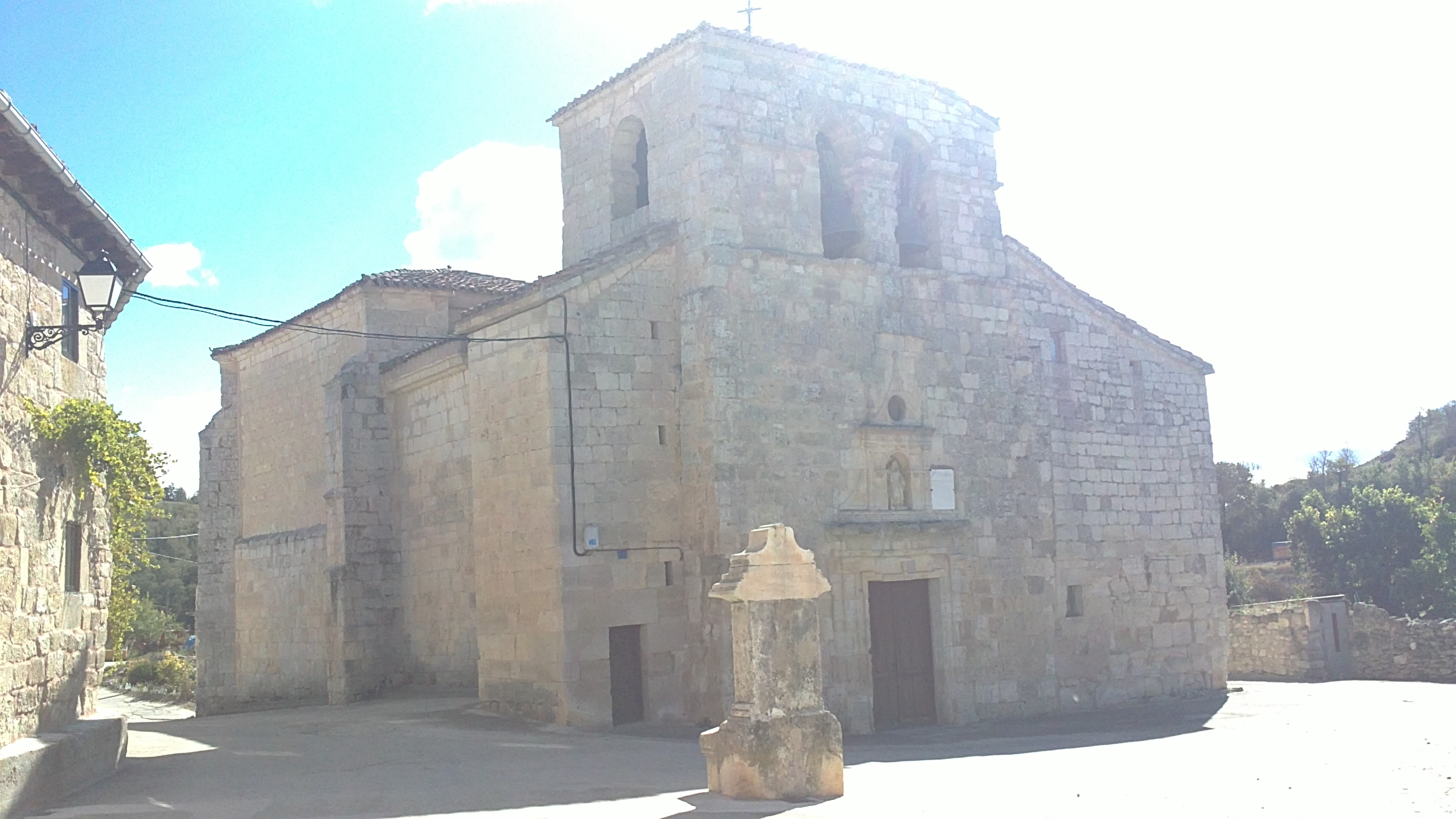 Vista de la plaza de la Iglesia de San Esteban Protomartir